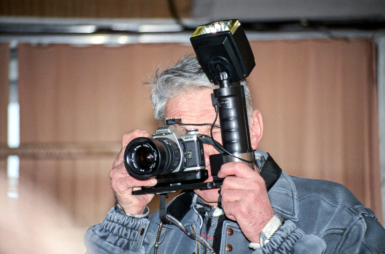 Анатолий Григорьевич Чайко, переславский фотограф, фотографирует на открытии выставки рисунков Рериха в культурном центре «Славич».